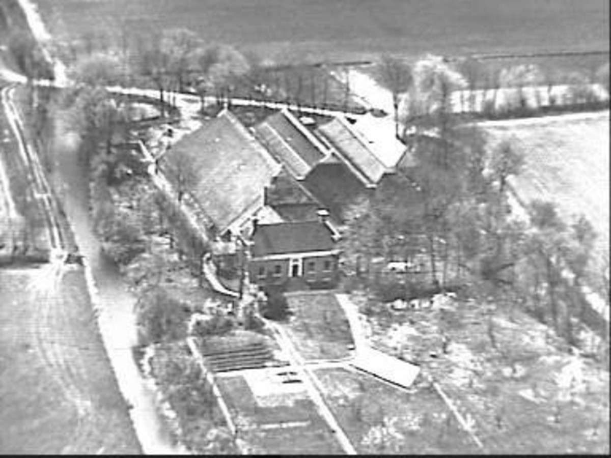 De Karshof: zij- en voorgevel luchtfoto (opmerking: Deze afbeelding hebben wij helaas alleen in deze lage resolutie.) This is a possible Rijksmonument:Find the monument in the Monuments database:Karshofweg 2 in StartenhuizenAll Rijksmonumenten in StartenhuizenIs this a Rijksmonument?YesNoMore information about this project and help. More images to work at in Category:Possible Rijksmonumenten.